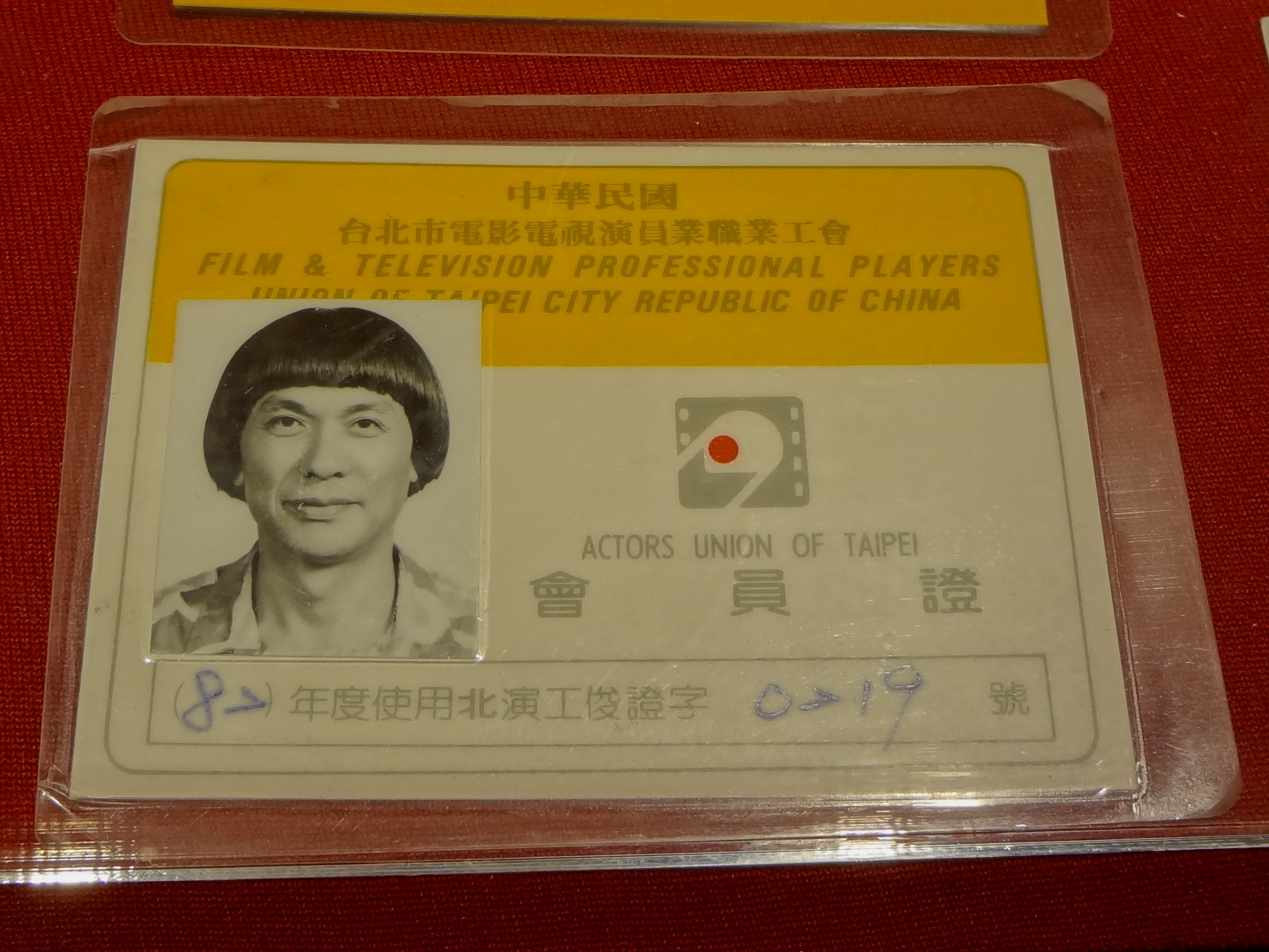 豬哥亮永恆時代展，台北市電影電視演員業職業工會發給豬哥亮的中華民國82年會員證。